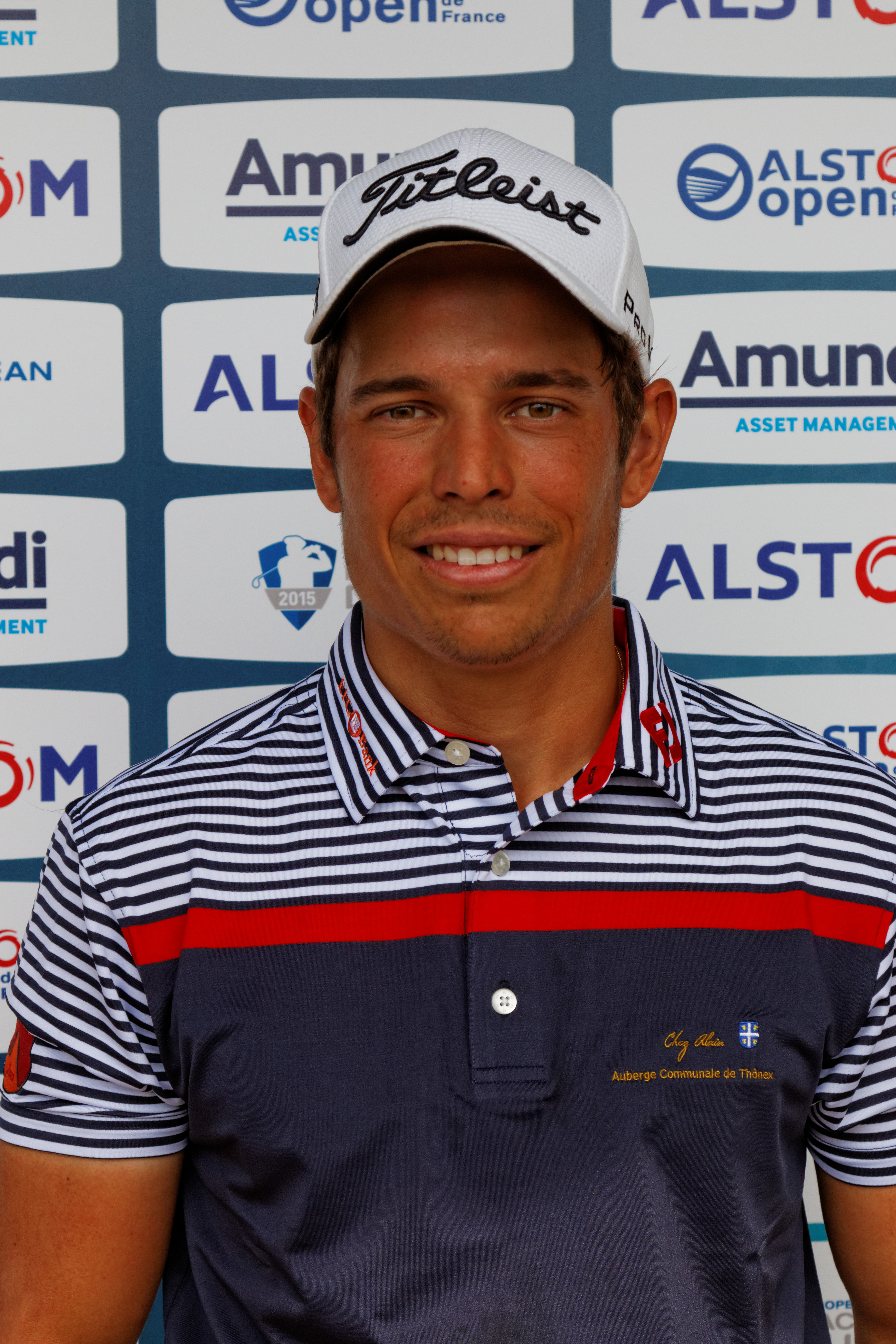 photo prise lors de l'Alstom - Open de France de Golf 2015